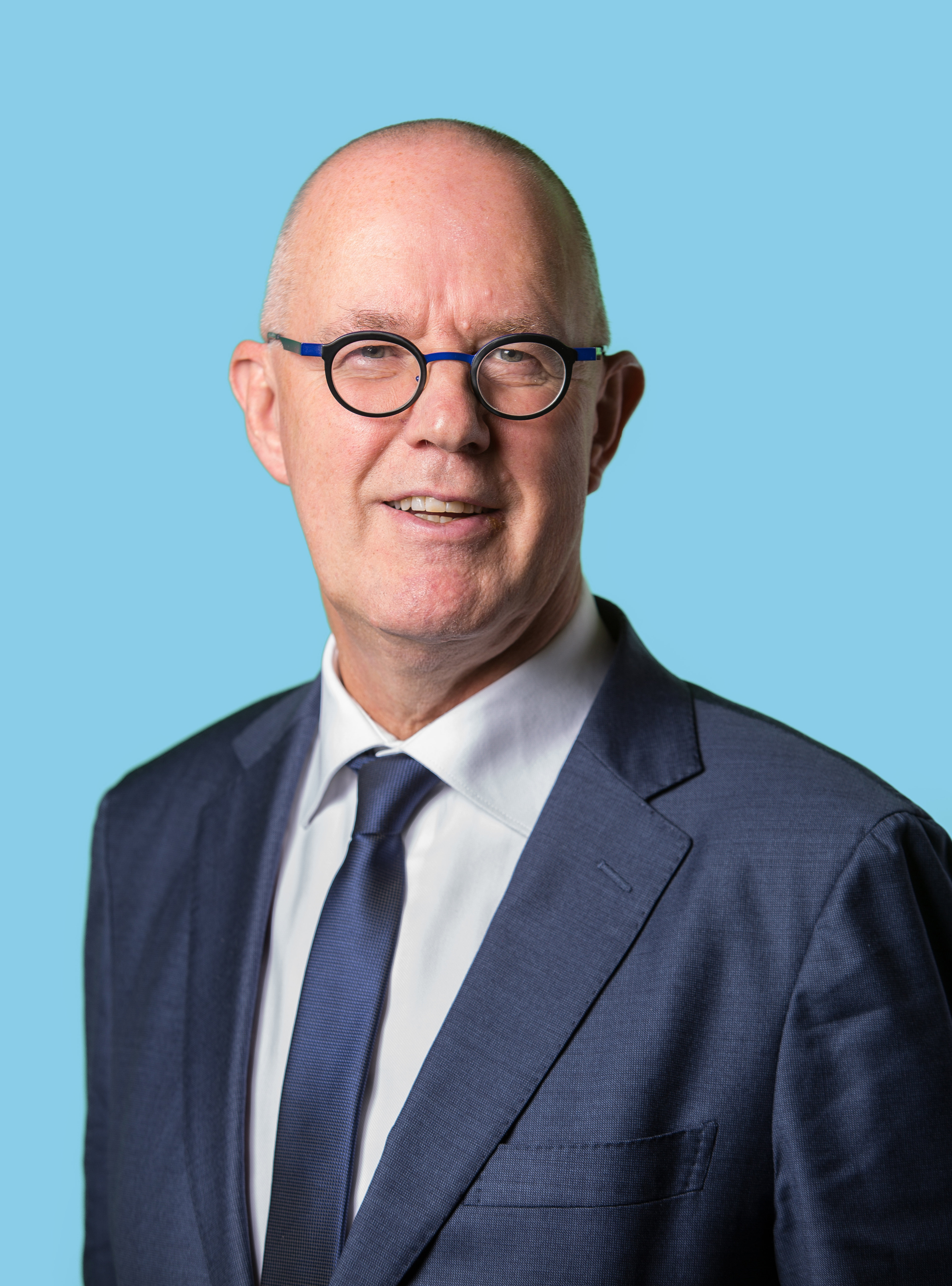 22 november 2016. Tweede Kamerlid voor de Partij van de Arbeid. Foto: Lex Draijer.